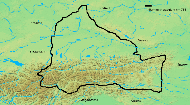 Das bairische Stammesherzogtum um 788. Die Karte wurde auf der Grundlage einer Karte des Demis Map Servers (Public Domain) selbst erstellt.